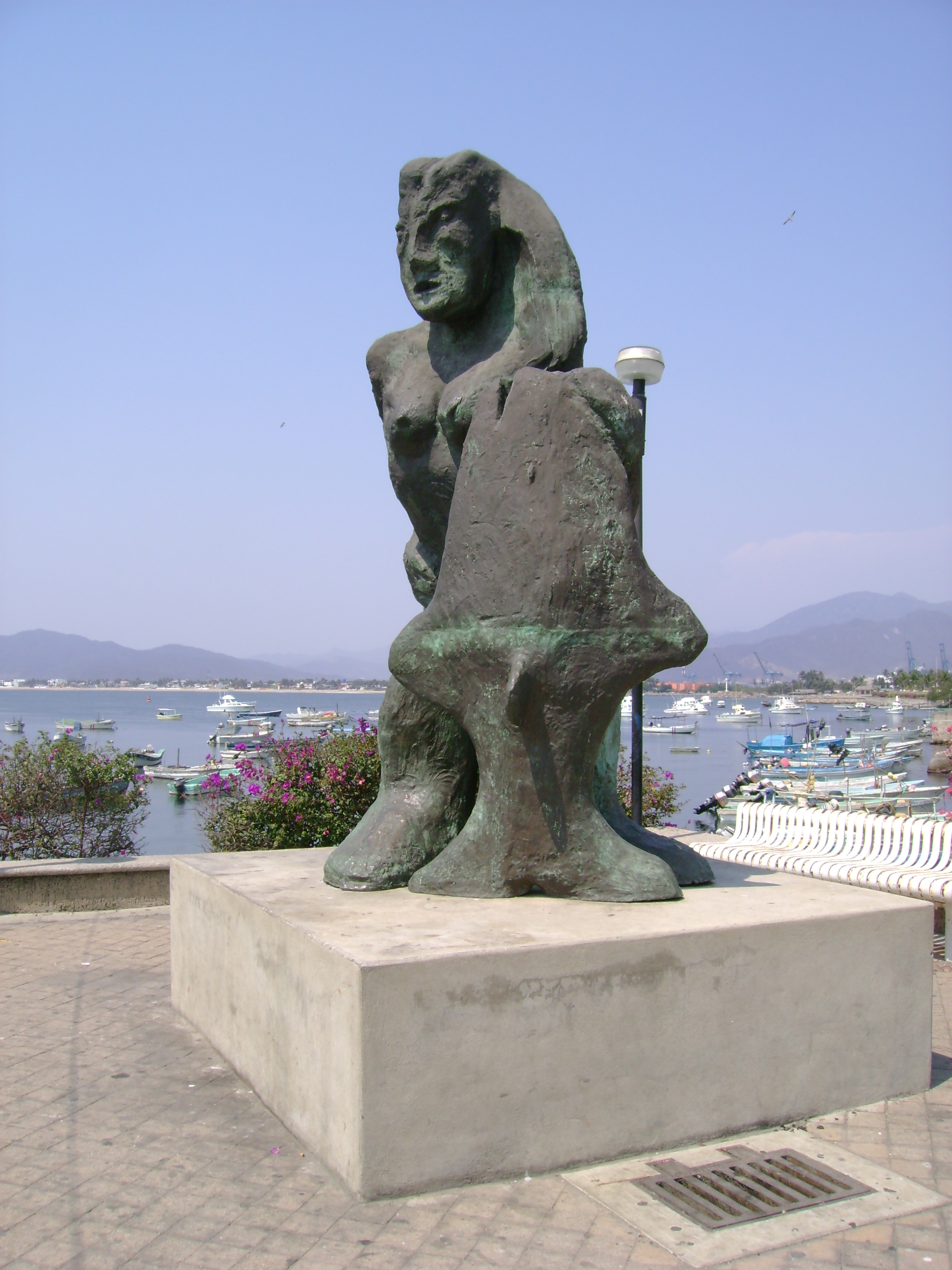 La Pescadora, obra del maestro mexicano Roger Von Gunten en la ciudad de Manzanillo, Colima, Mexico.